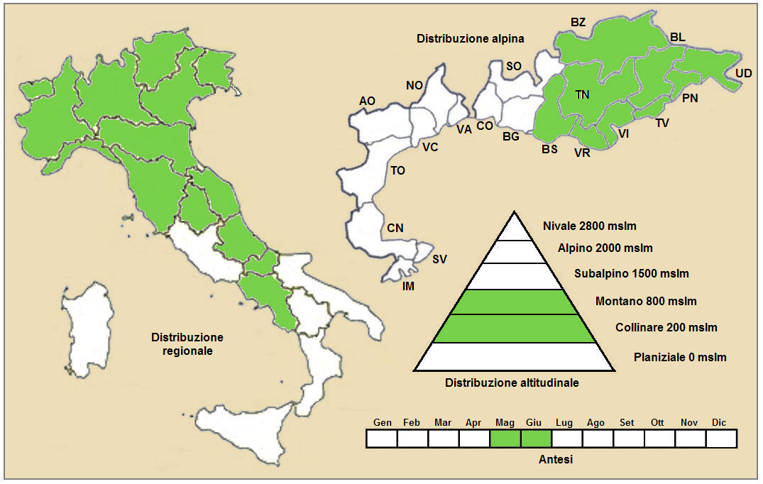 Anemone trifolia - Distribuzione